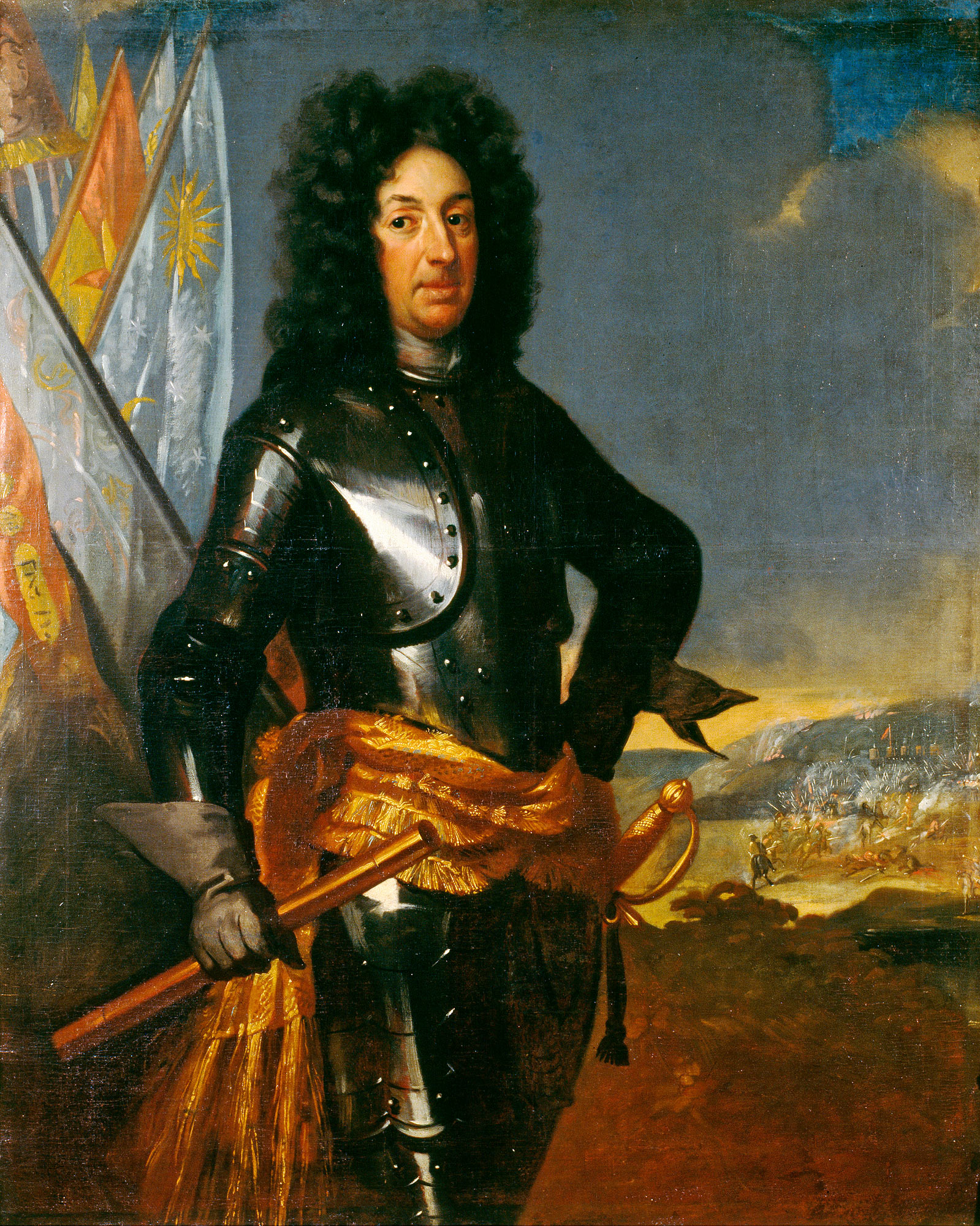 Rootsi kindral XVIII sajandi algul.